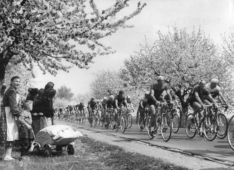 Friedensfahrt, Fahrerfeld, Zuschauer Zentralbild Wendorf Ks-Po 11.5.1960 - XIII. Friedensfahrt 1960 - 8. Etappe. UBz: Zwischen blühenden Bäumen jagt das Hauptfeld dem Etappenziel in Poznan entgegen.